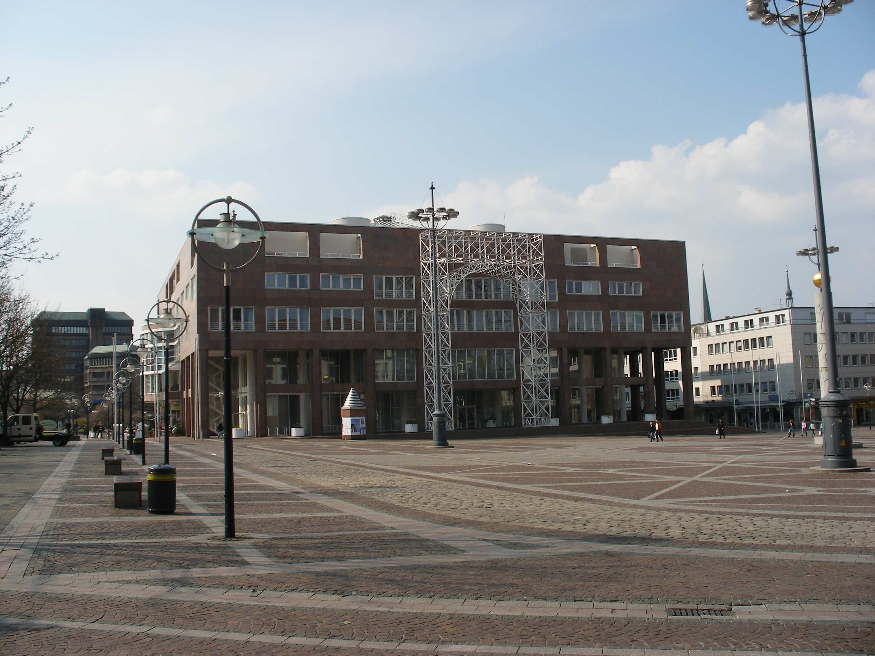 Dortmunder Rathaus, Friedensplatz